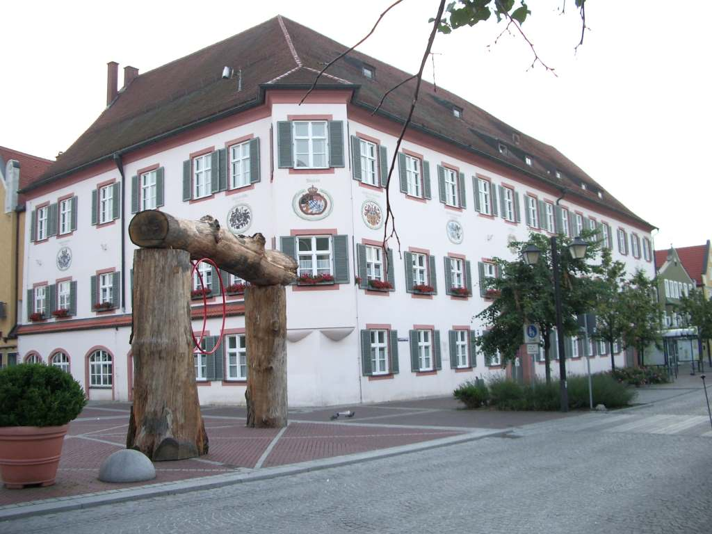 Erding Rathaus